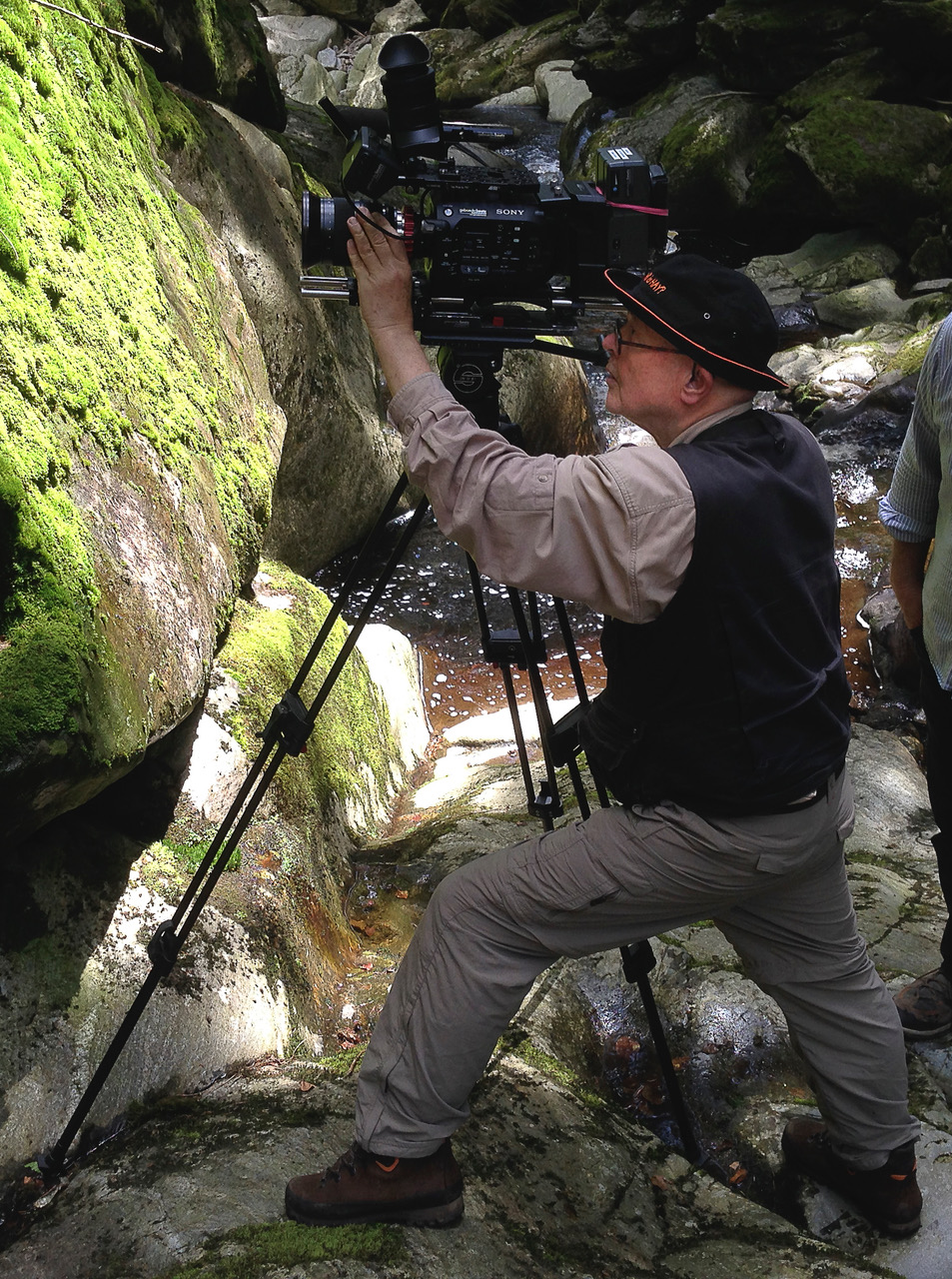 Der Kameramann Rainer M. Schulz bei Dreharbeiten im Nationalpark "Bayerischer Wald" nahe dem Ort Glashütte. Foto: Fritz Hartthaler